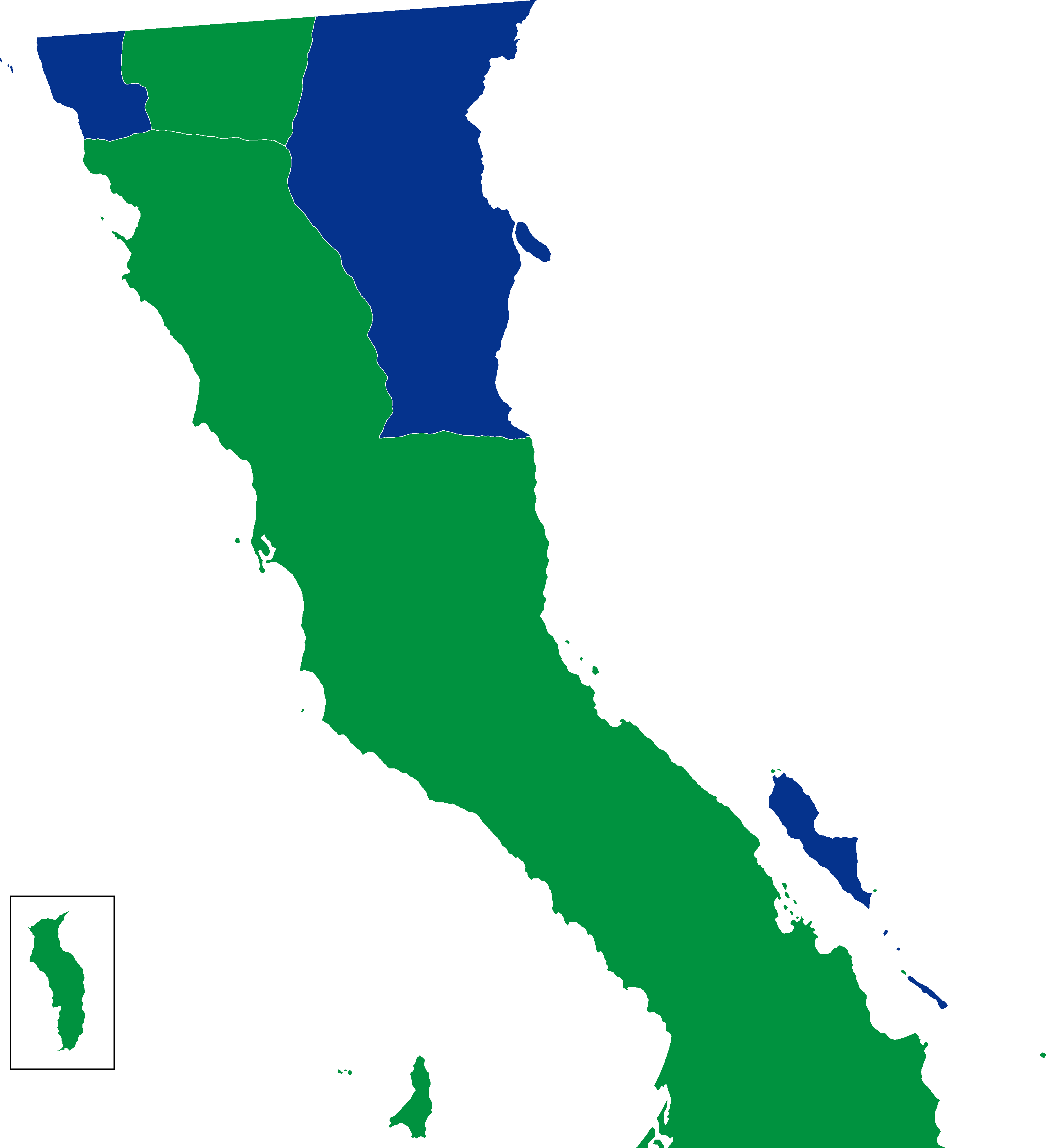 Resultados de la elección a Ayuntamientos por partido político en el estado de Baja California, México en 1995